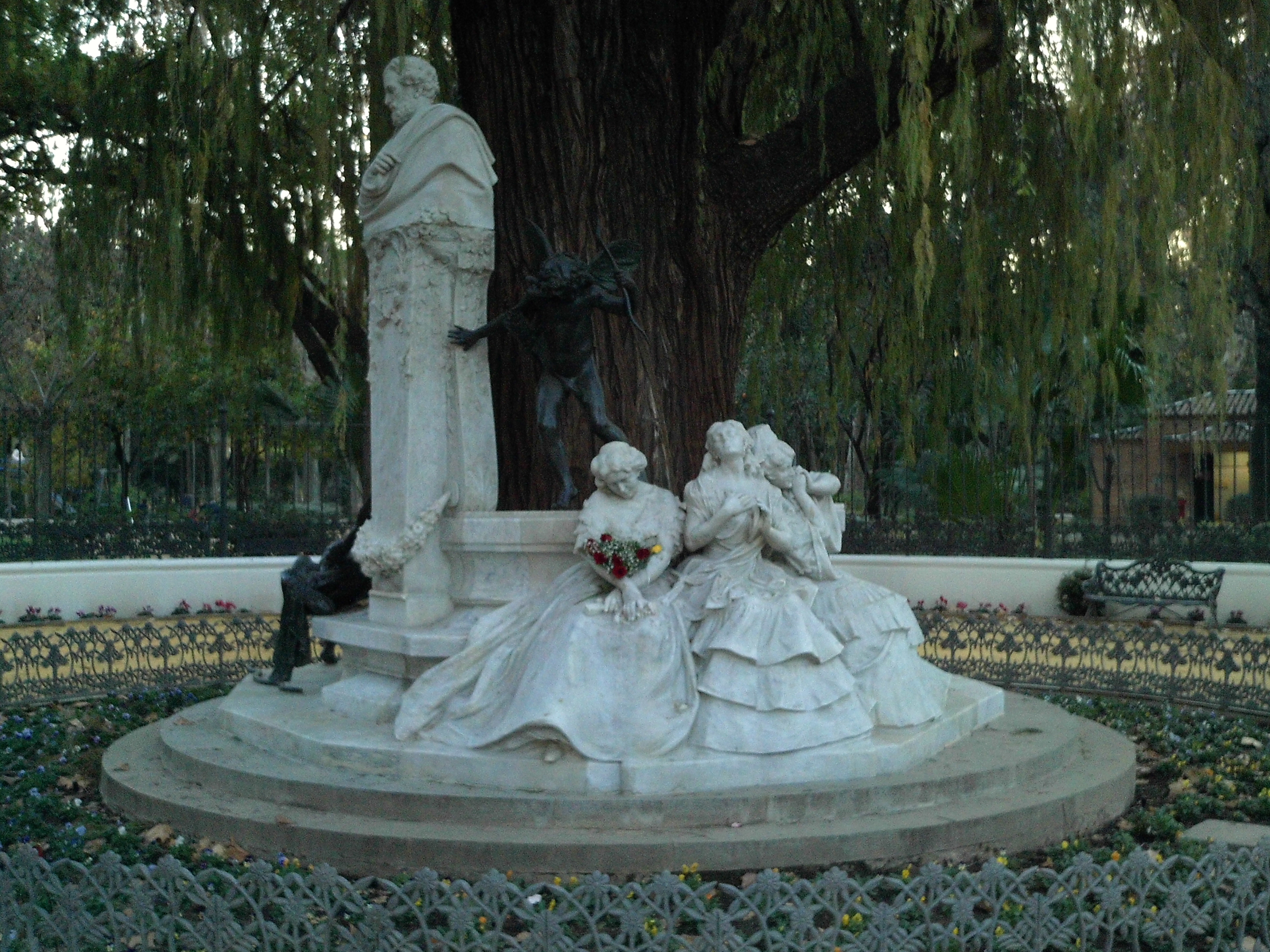 Glorieta de Bécquer. Parque de María Luisa, Sevilla, Andalucía, España.